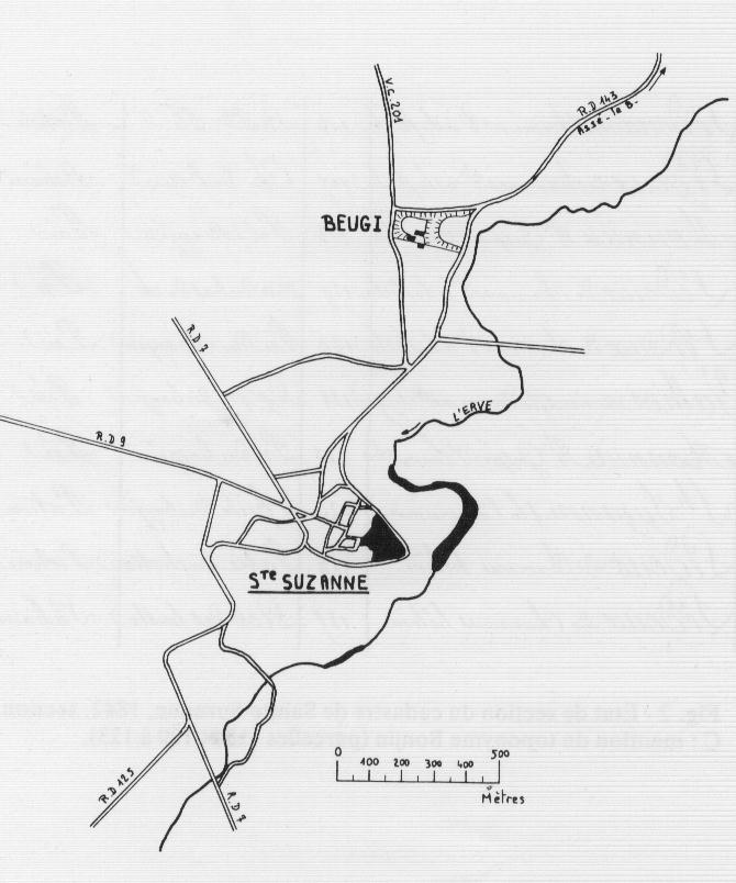 plan du camp de Beugy à Ste-Suzanne (Mayenne)